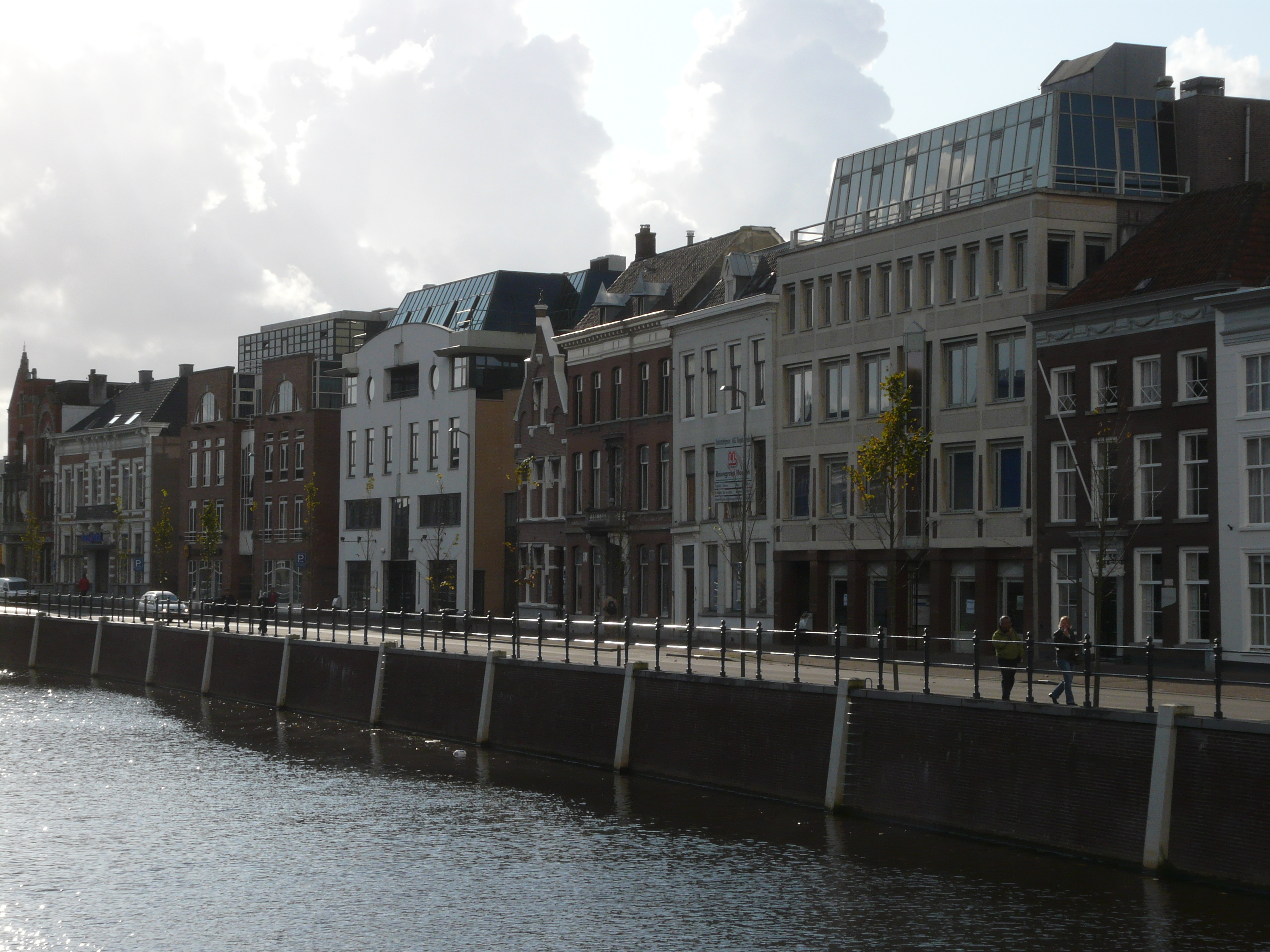 Zicht op een deel van de straat de Prinsenkade gelegen nabij de Haven van Breda in het centrum van Breda